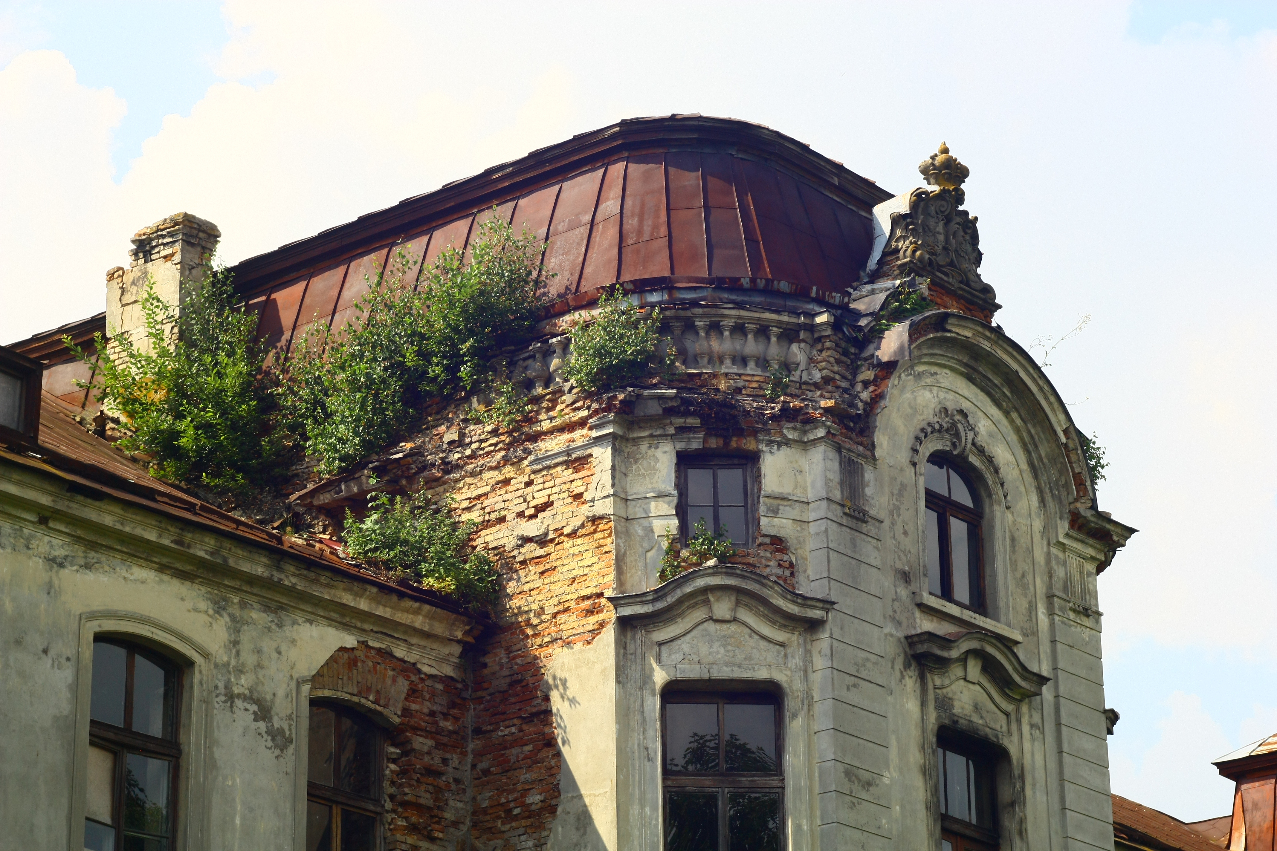 Беларуская (тарашкевіца): Комплекс былога палацу:палацфлігельрэшткі былога млынукузьнягаспадарчыя пабудовырэшткі былога парку. г.п. Жалудок This is a photo of Belarusian heritage monument. Reference number: 412Г000627 ( WLM)